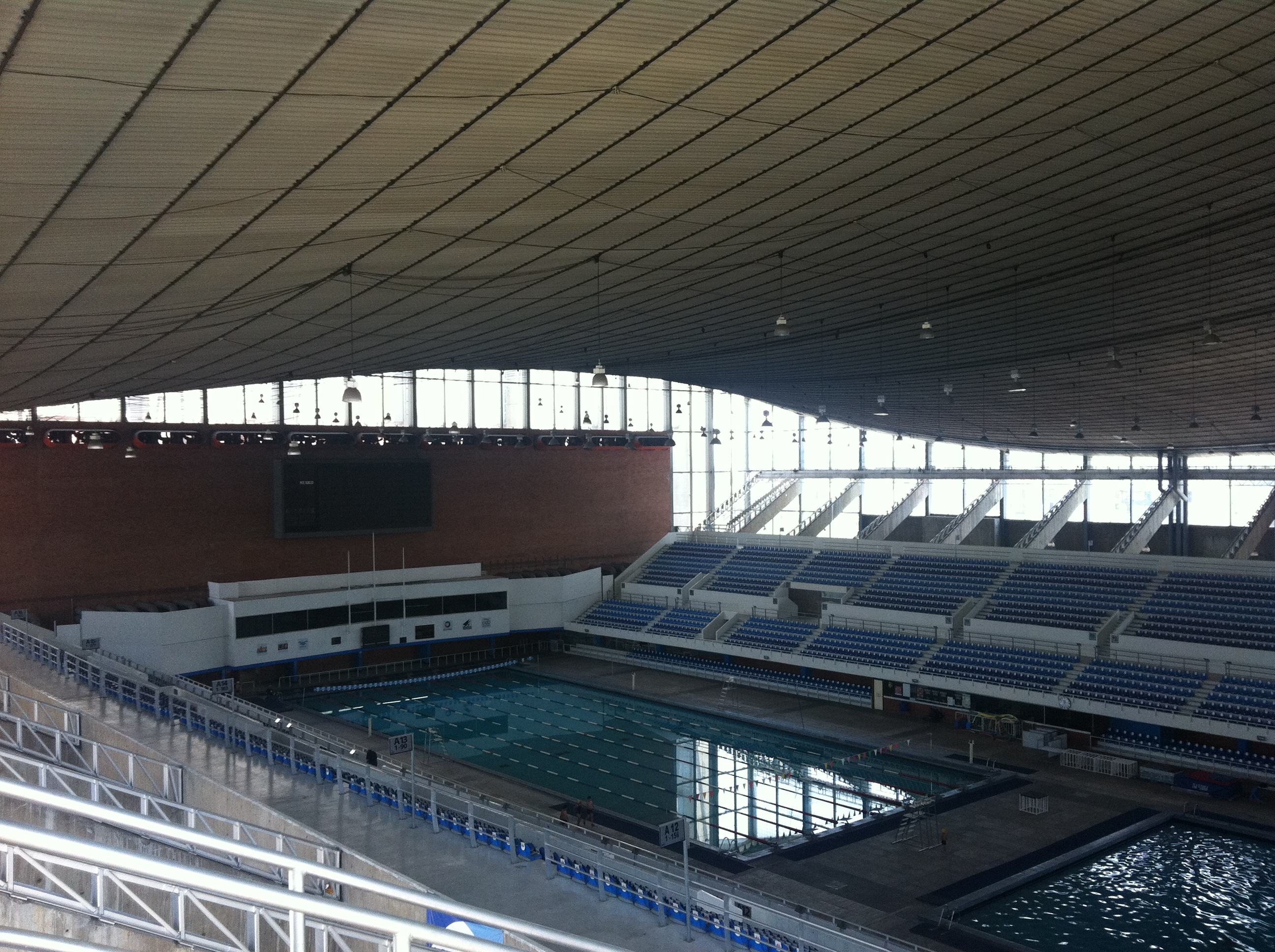 Alberca Olimpica